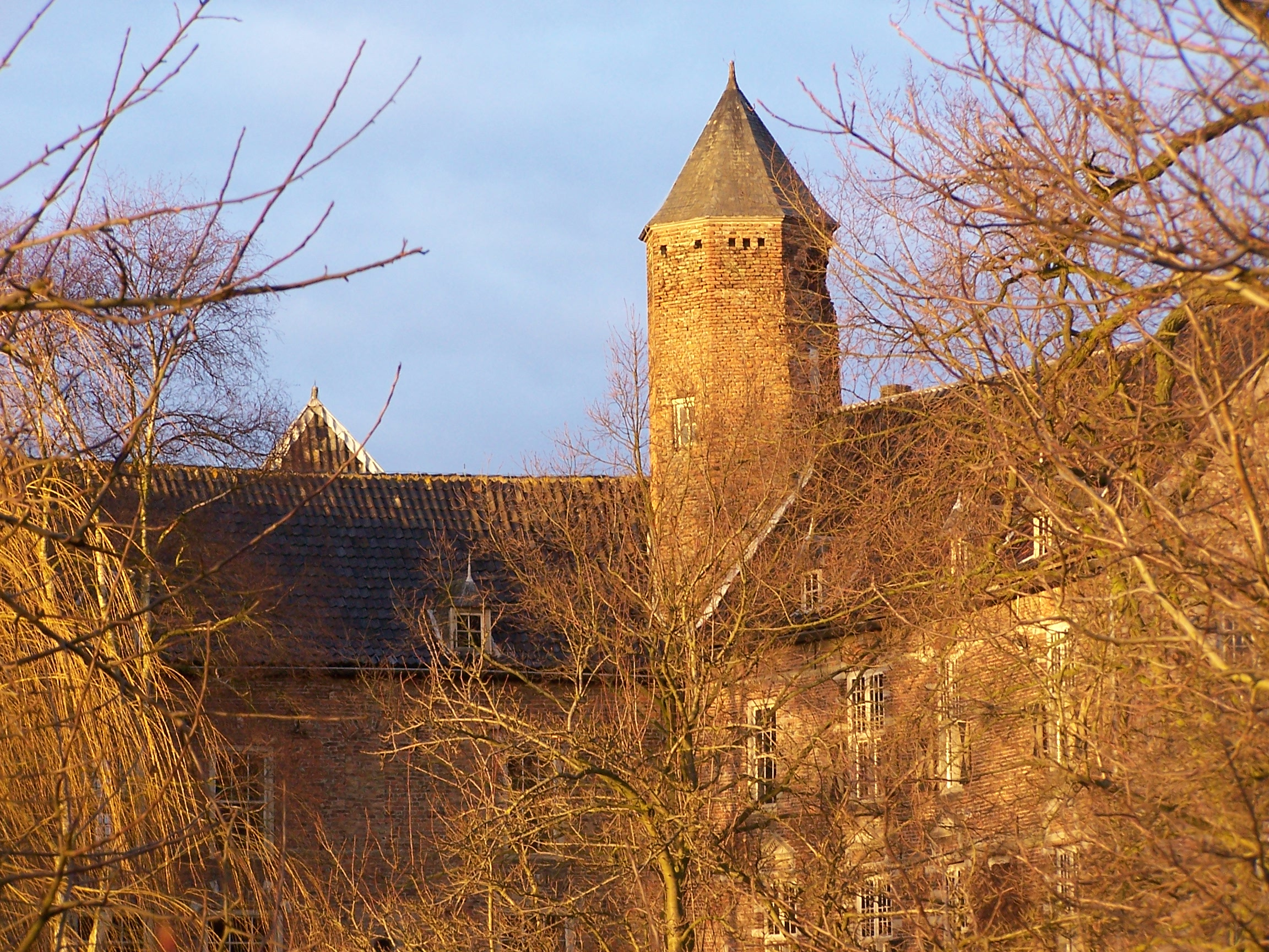 Auteursrechten: J. van Beemen